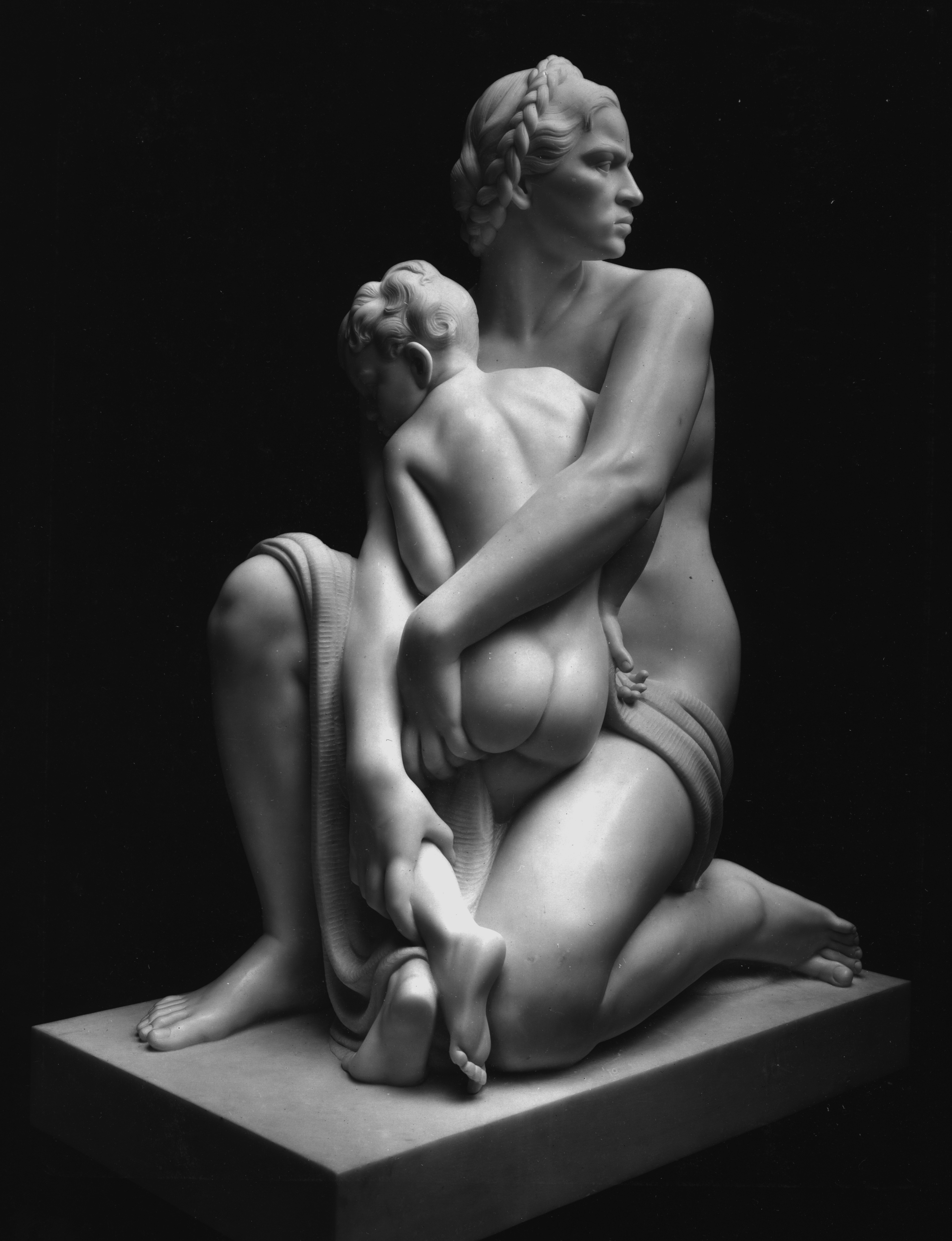 Gruppo rappresentativo della madre in difesa del figlio